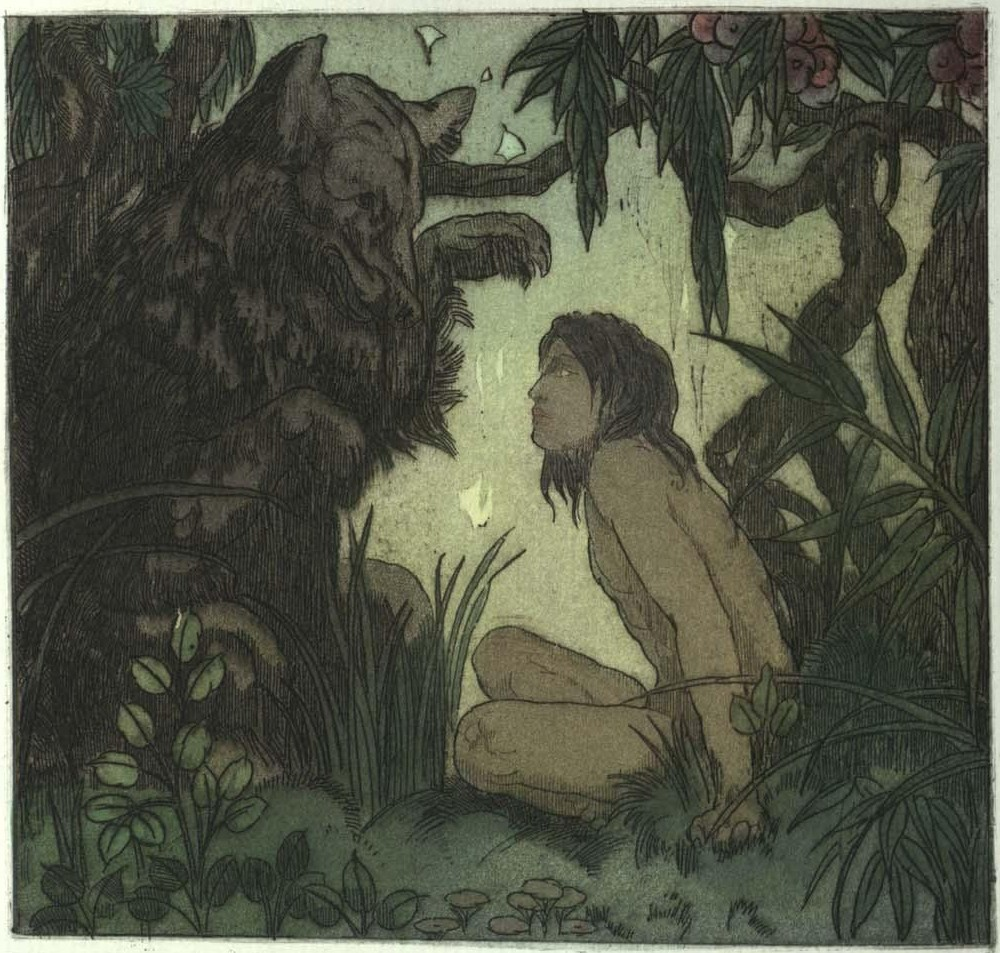 Illustration du Livre de la jungle de Kipling.